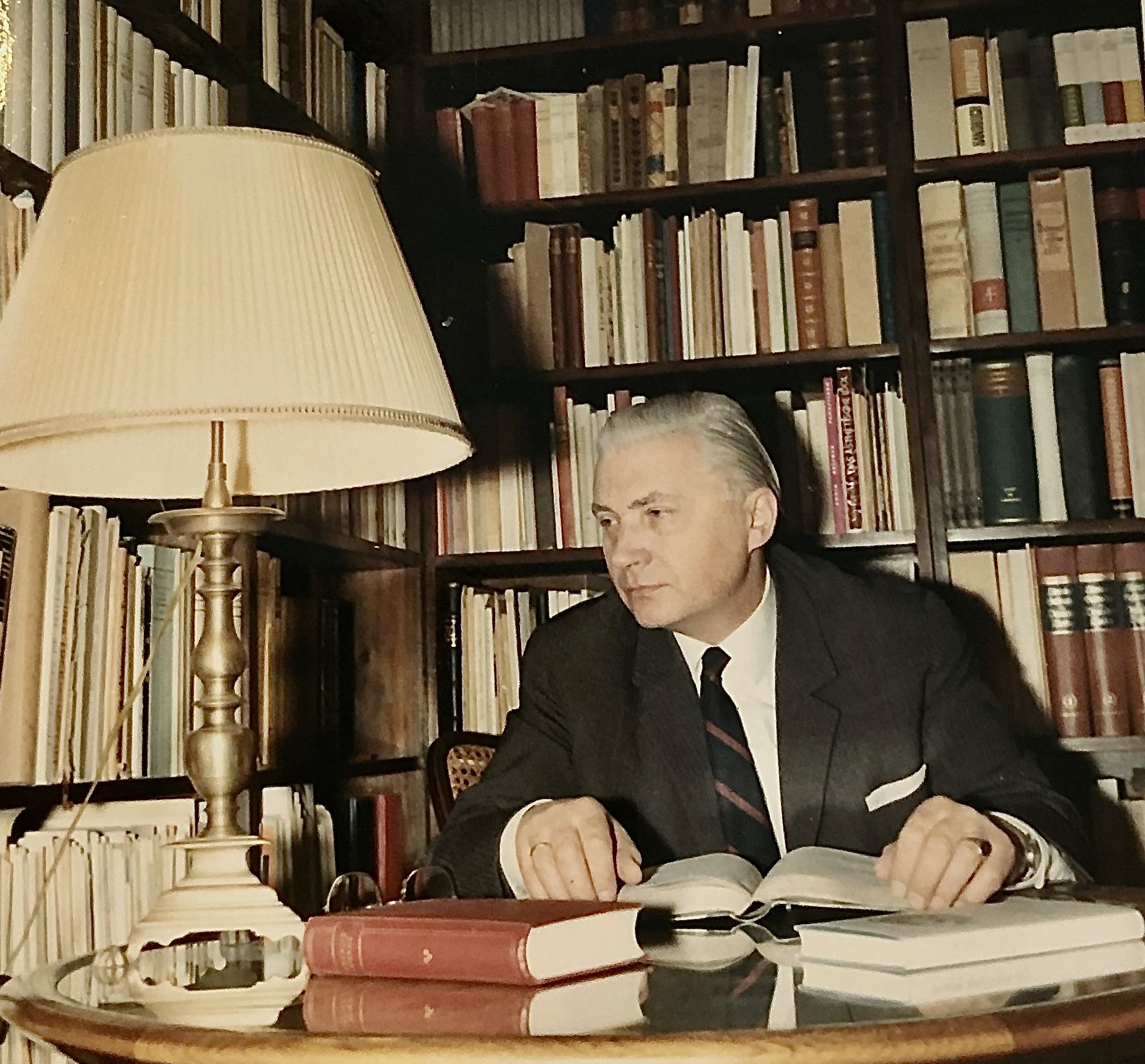 In seinem Arbeitszimmer, ca. 1970